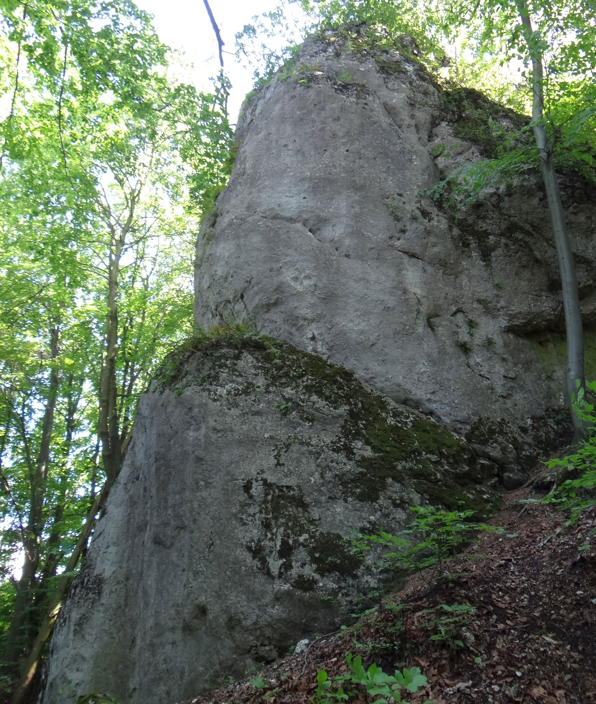 Kubincowe Skały w Pierunkowym Dole w Nielepicach